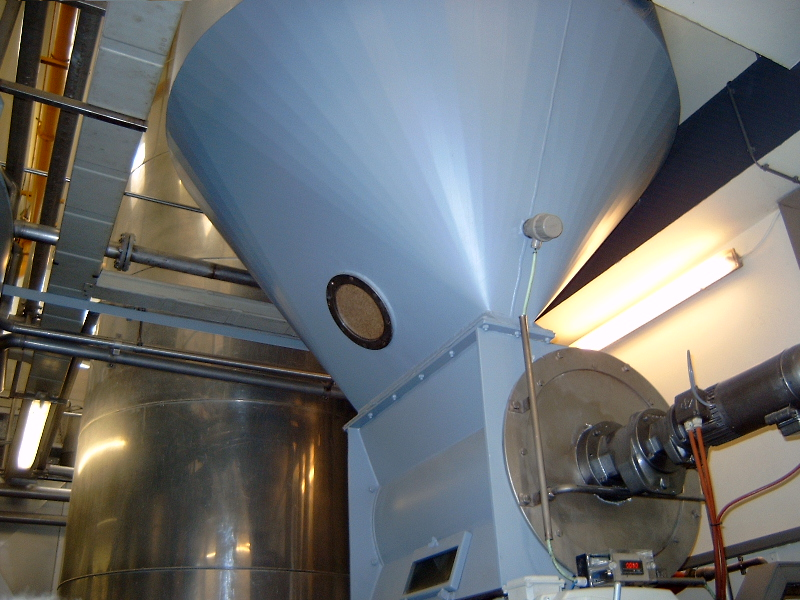 Professionele schrootmolen